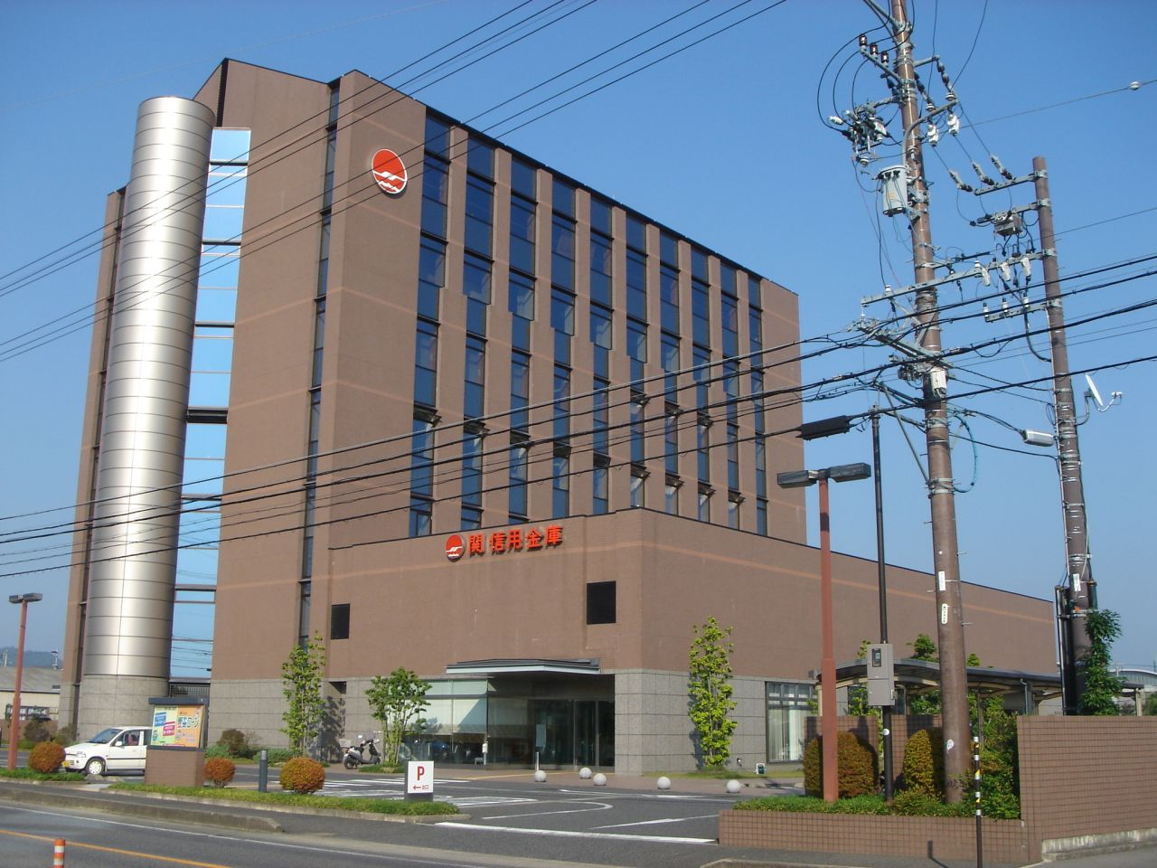 Seki Shinkyo Kinko Bank's Head Office（関信用金庫本部、本店）,Seki,Gifu,Japan(岐阜県関市)で撮影。